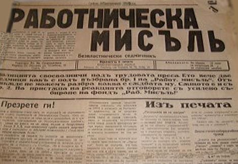 Безвластнически седмичник "Работническа мисъл"